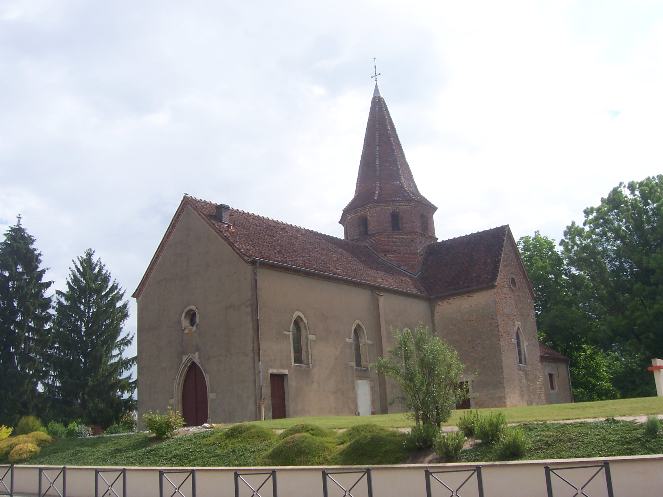 Eglise de La Chapelle-Naude